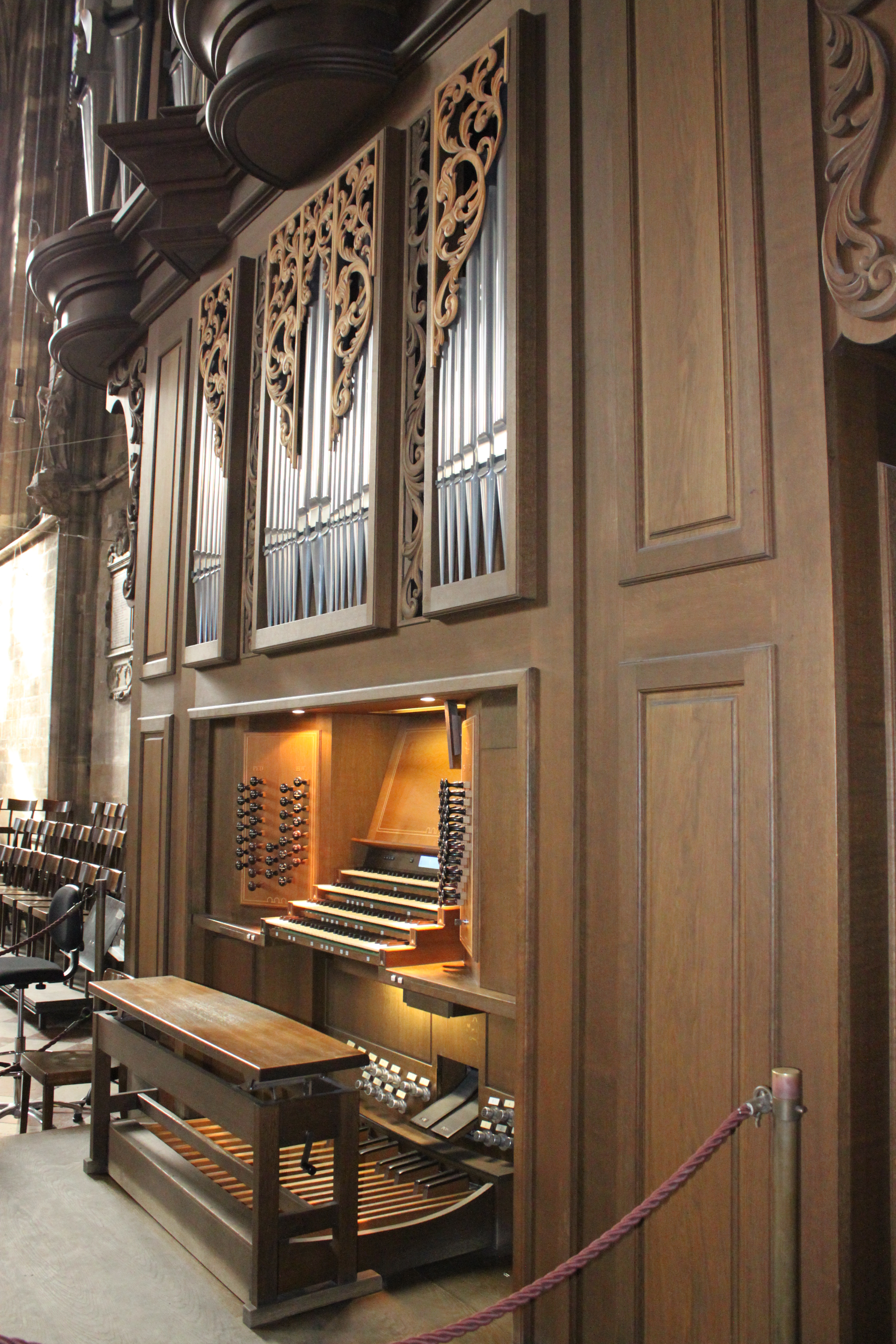 Spieltafel der Domorgel (errichtet 1991 von Rieger Orgelbau) des Wiener Stephansdoms